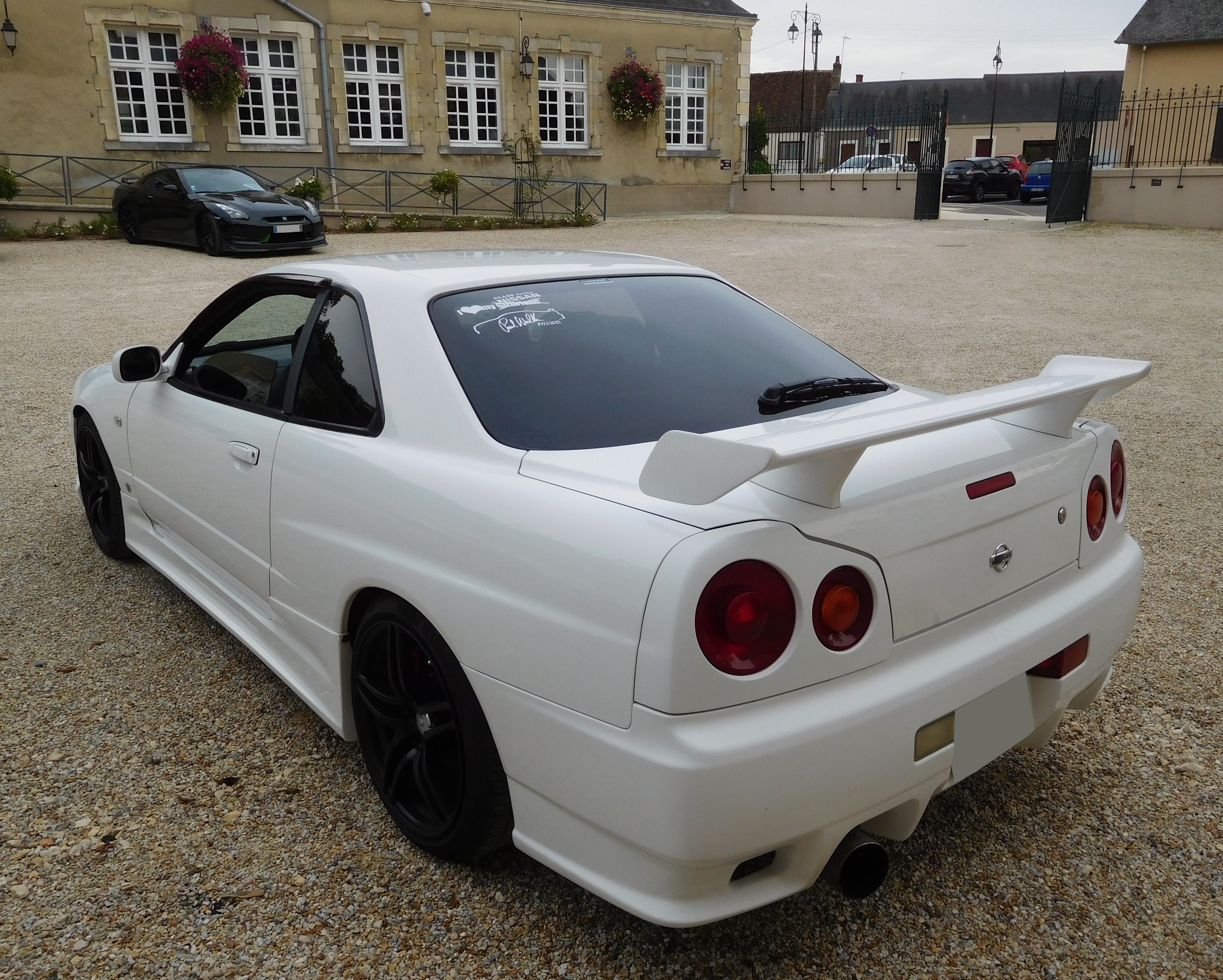 Nissan Skyline R34.